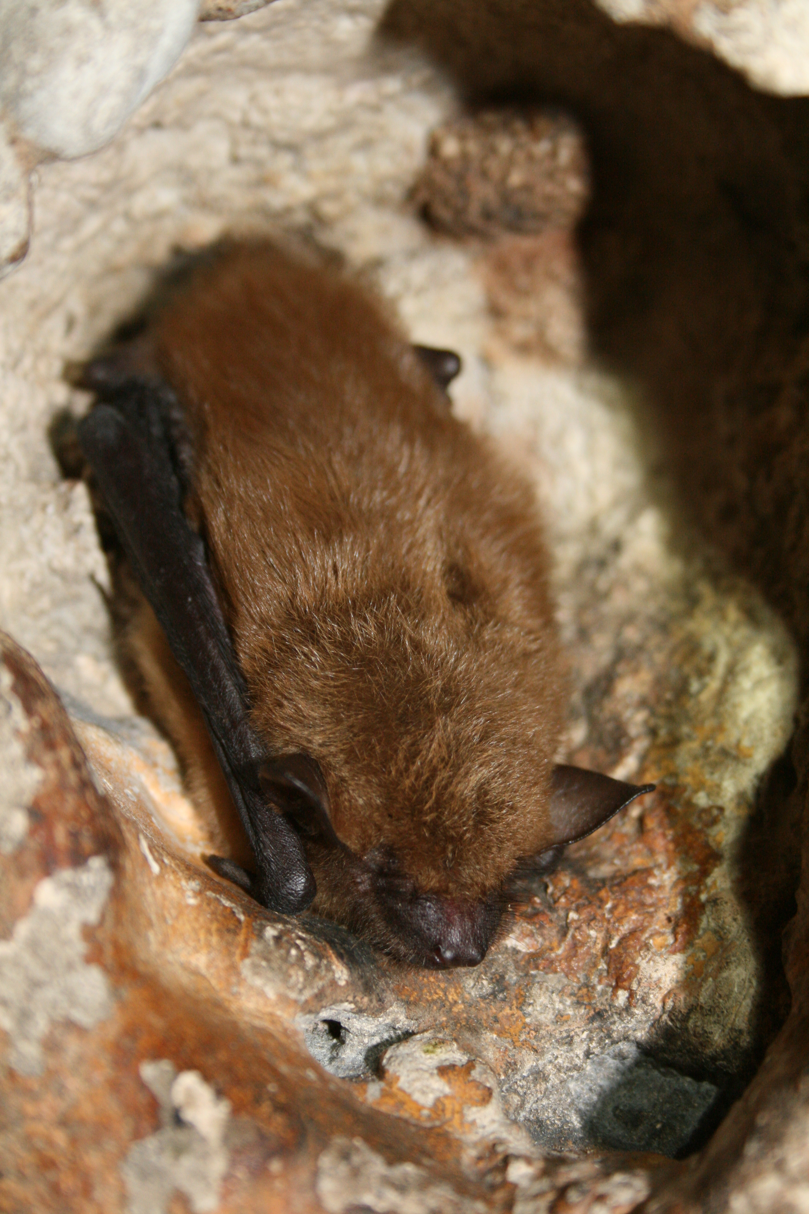 credit USFWS/Ann Froschauer